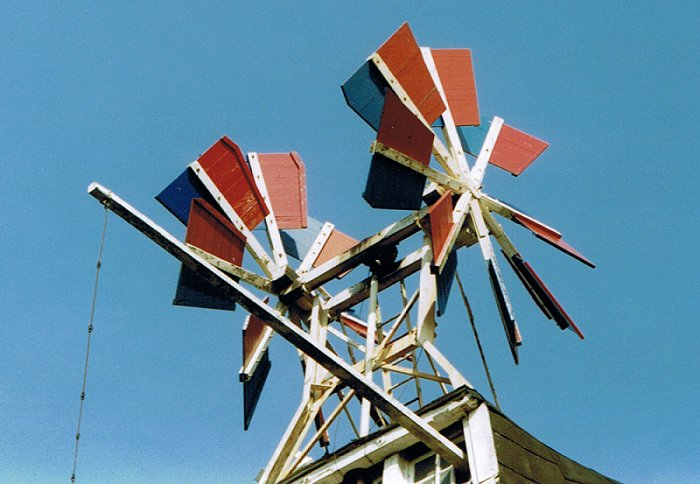 Doppelte Windrose bei der Moorseer Mühle in Nordenham-Moorsee im Landkreis Wesermarsch. Die Schaufeln sind in den Oldenburger Landesfarben gestrichen.